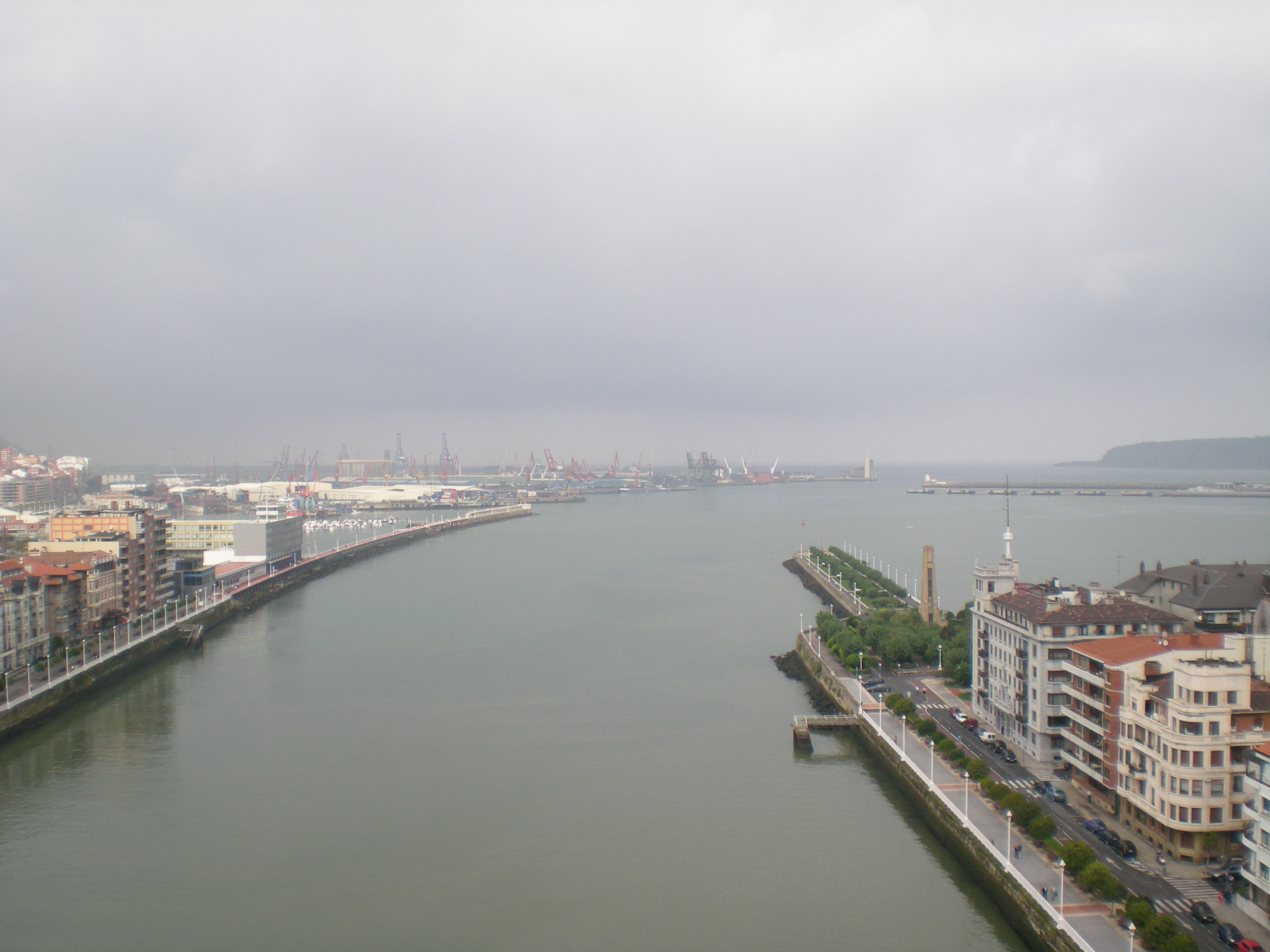 Portugaleteko burdinazko kaia eta Getxoko Txurrukaren oroitarria